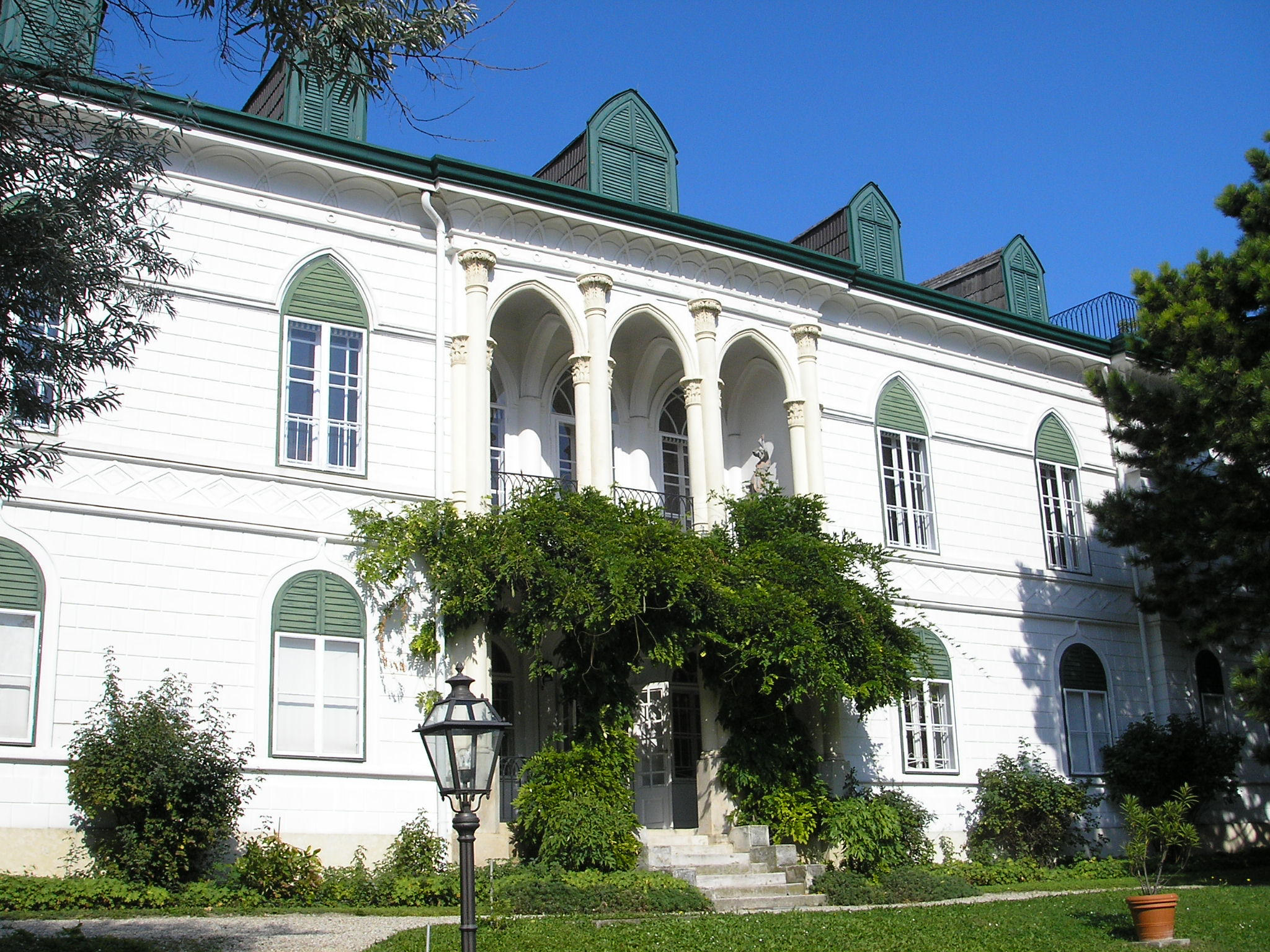 Image of the Geymüllerschlössel in Pötzleinsdorf in the Viennese district of Währing.